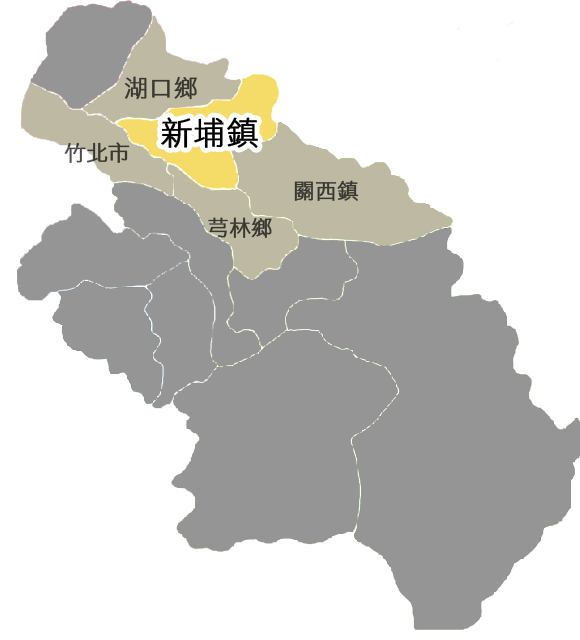 新埔鎮相對位置。